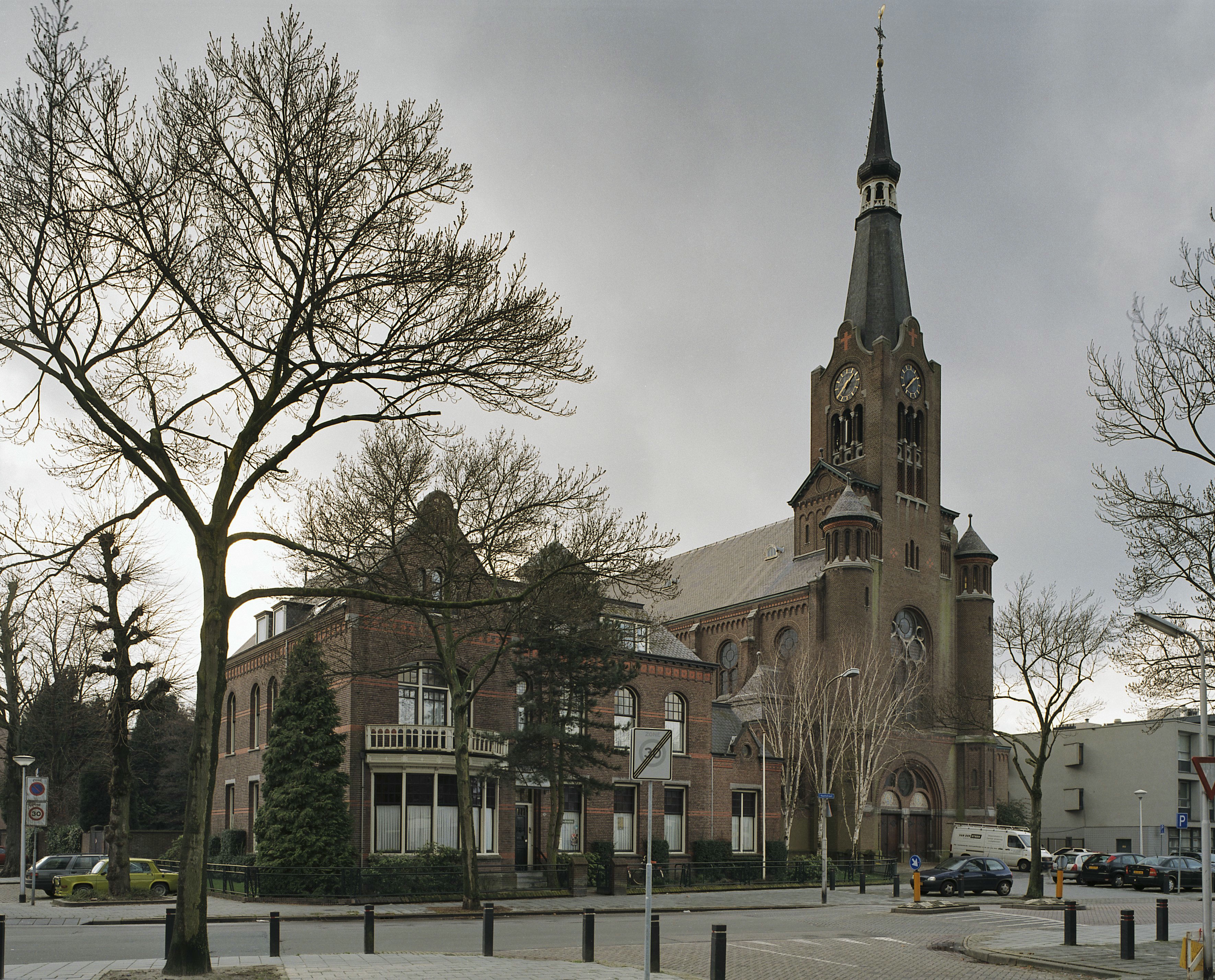 Kerk/pastorie: Overzicht kerk en pastorie